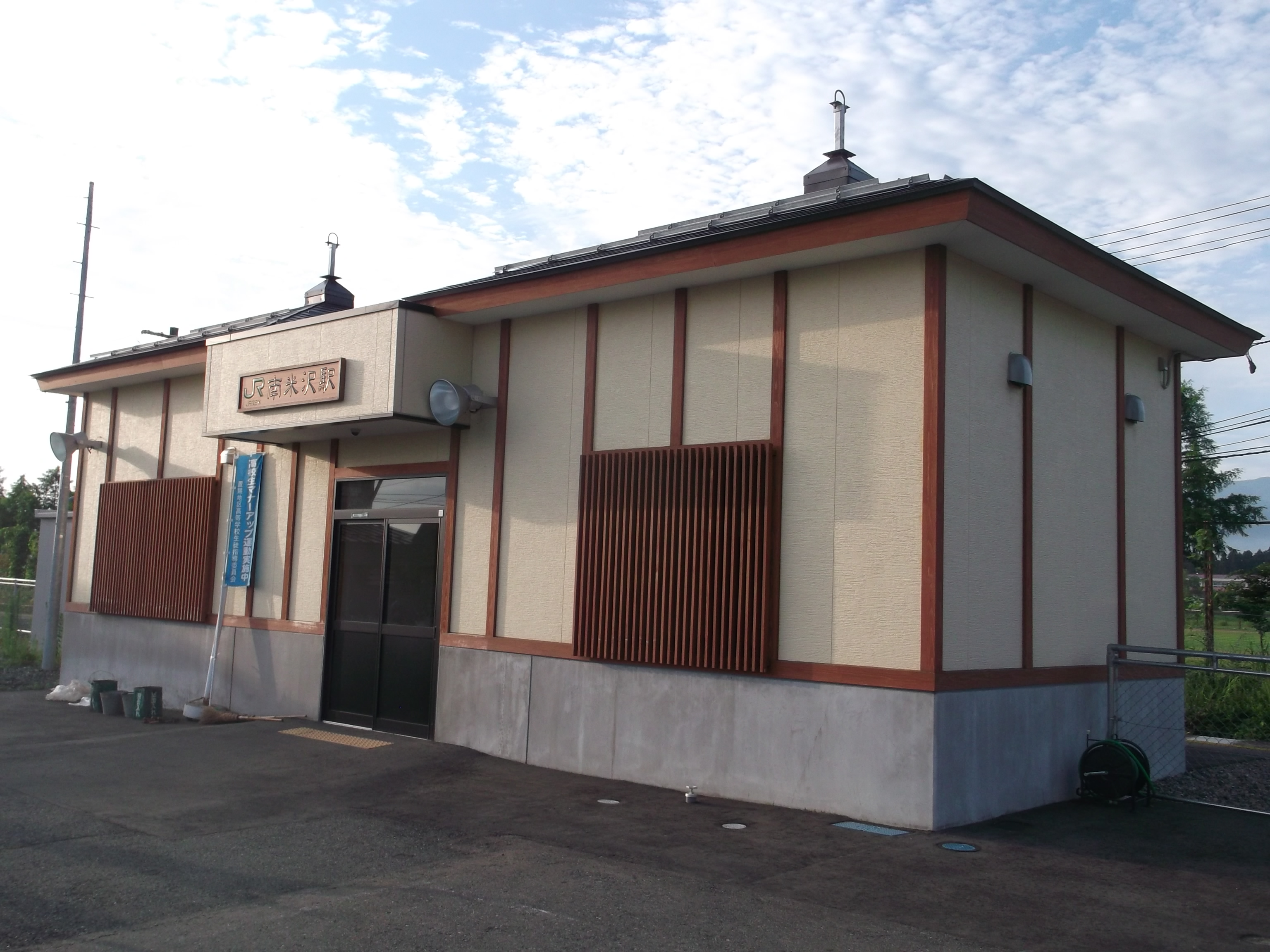 JR米坂線 南米沢駅駅舎